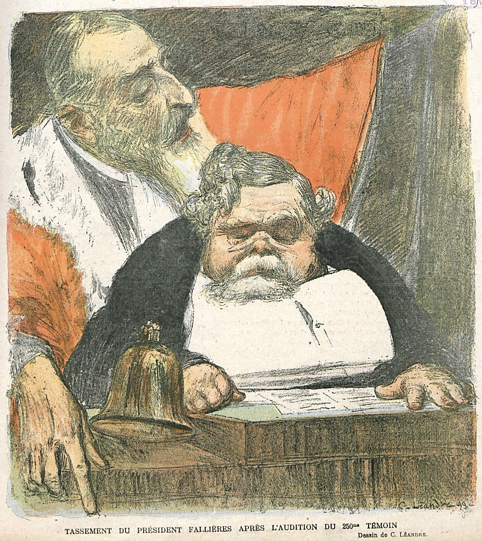 "M. le président Fallières et le procureur général Octave Bernard", "Tassement du président Fallières après l'audition du 250ème témoin".